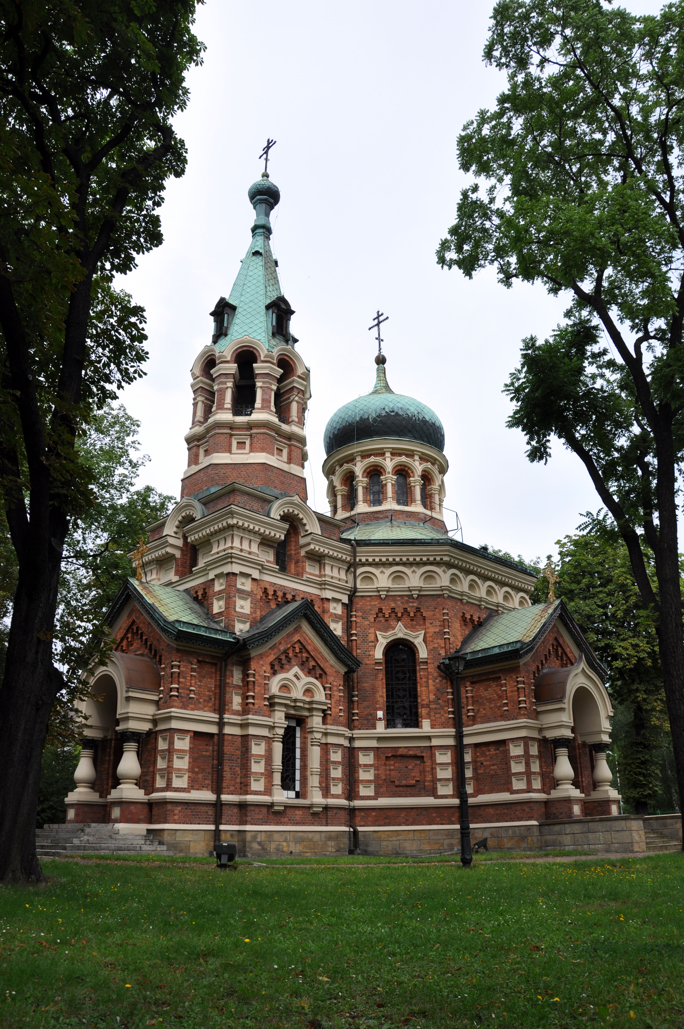 Sosnowiec, ul. Kilińskiego 37 - Cerkiew Prawosławna